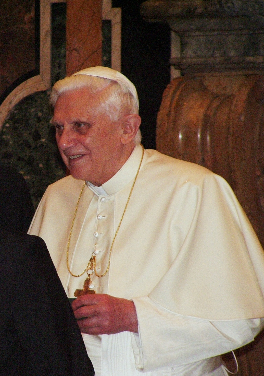 Pope Benedictus XVI at a private audience (january,20 - 2006)